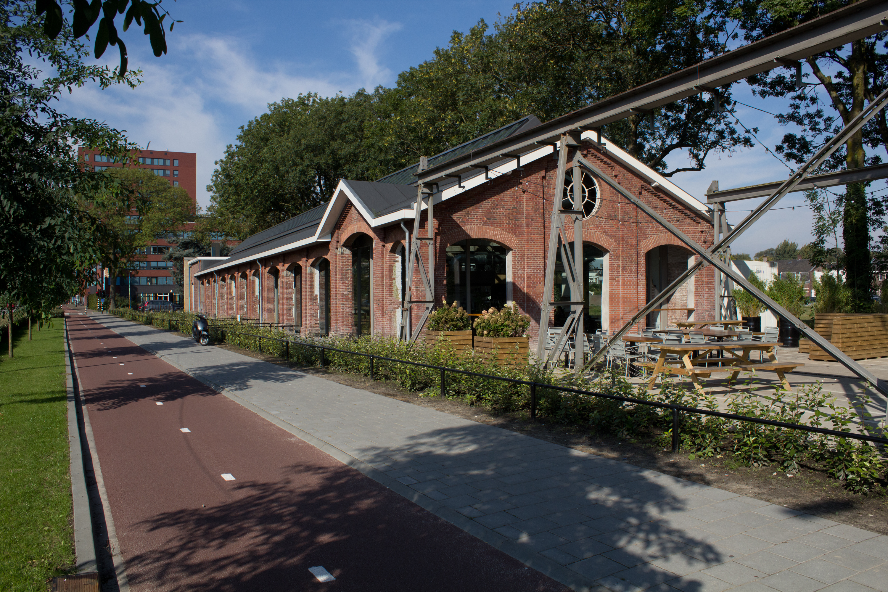 Een van de gebouwen aan de spoorzone/Burgermeester Brokxlaan, nu Gemeentelijk Monument.